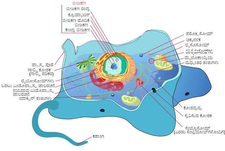 ಕನ್ನಡ: ಮಾದರಿ ಪ್ರಾಣಿ ಜೀವಕೋಶದ ರಚನೆ